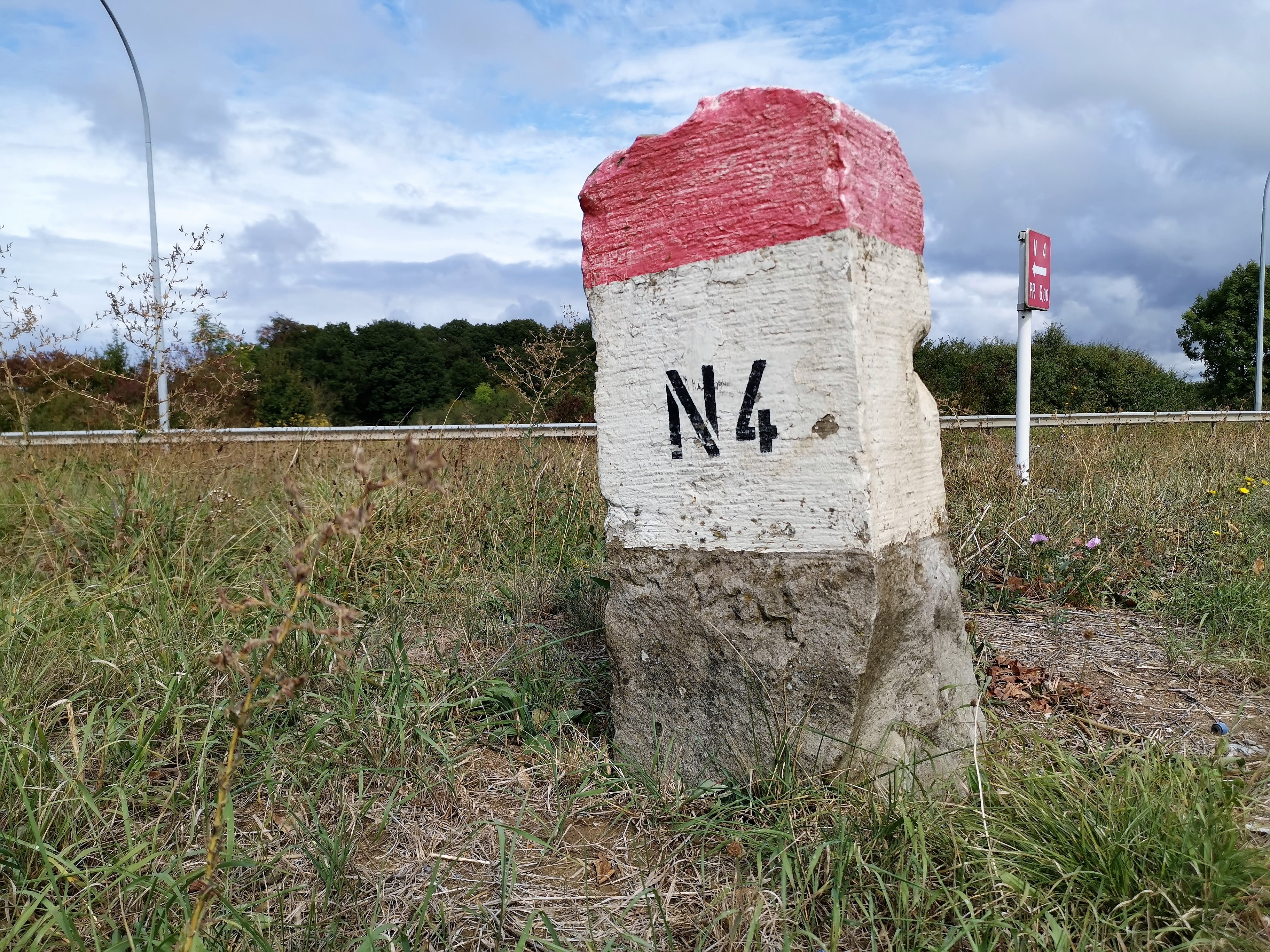 Borne kilométrique sur la N4 à Leudelange.